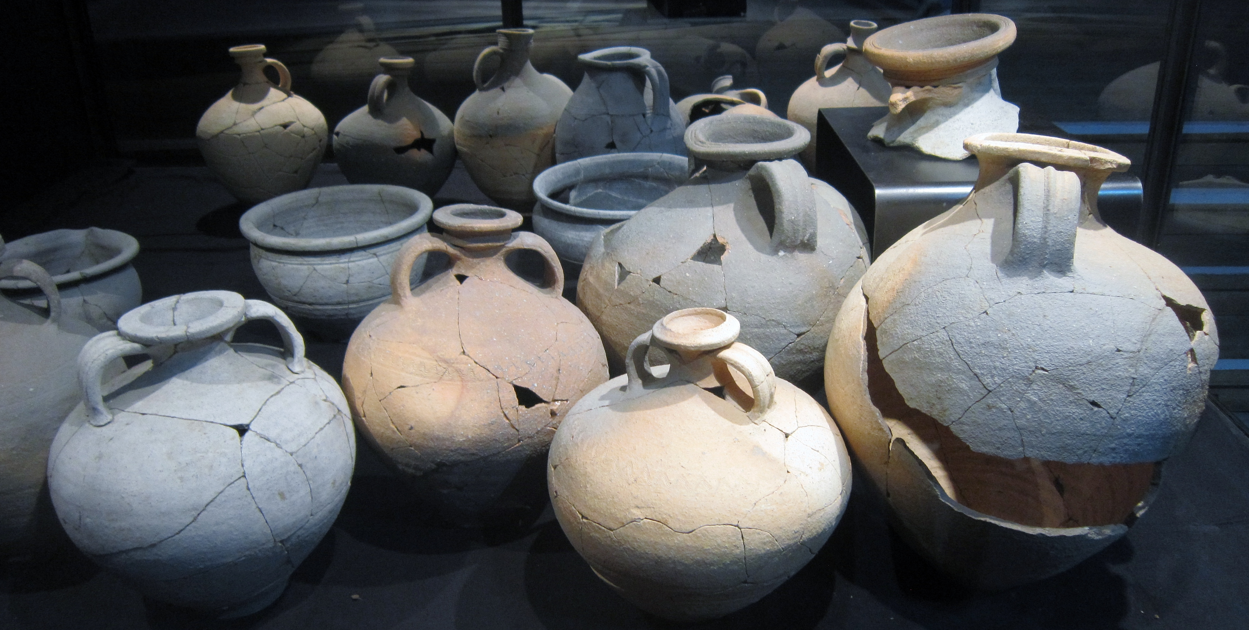 Céramiques (mortier, jatte à goulot verseur, jattes, cruches [une anse], amphores [deux anses]) provenant d'un atelier de potiers situé à Liscorno en Surzur (3e siècle après J.-C., Service Régional Archéologique Bretagne, exposition L'empreinte de Rome, musée de Douarnenez).